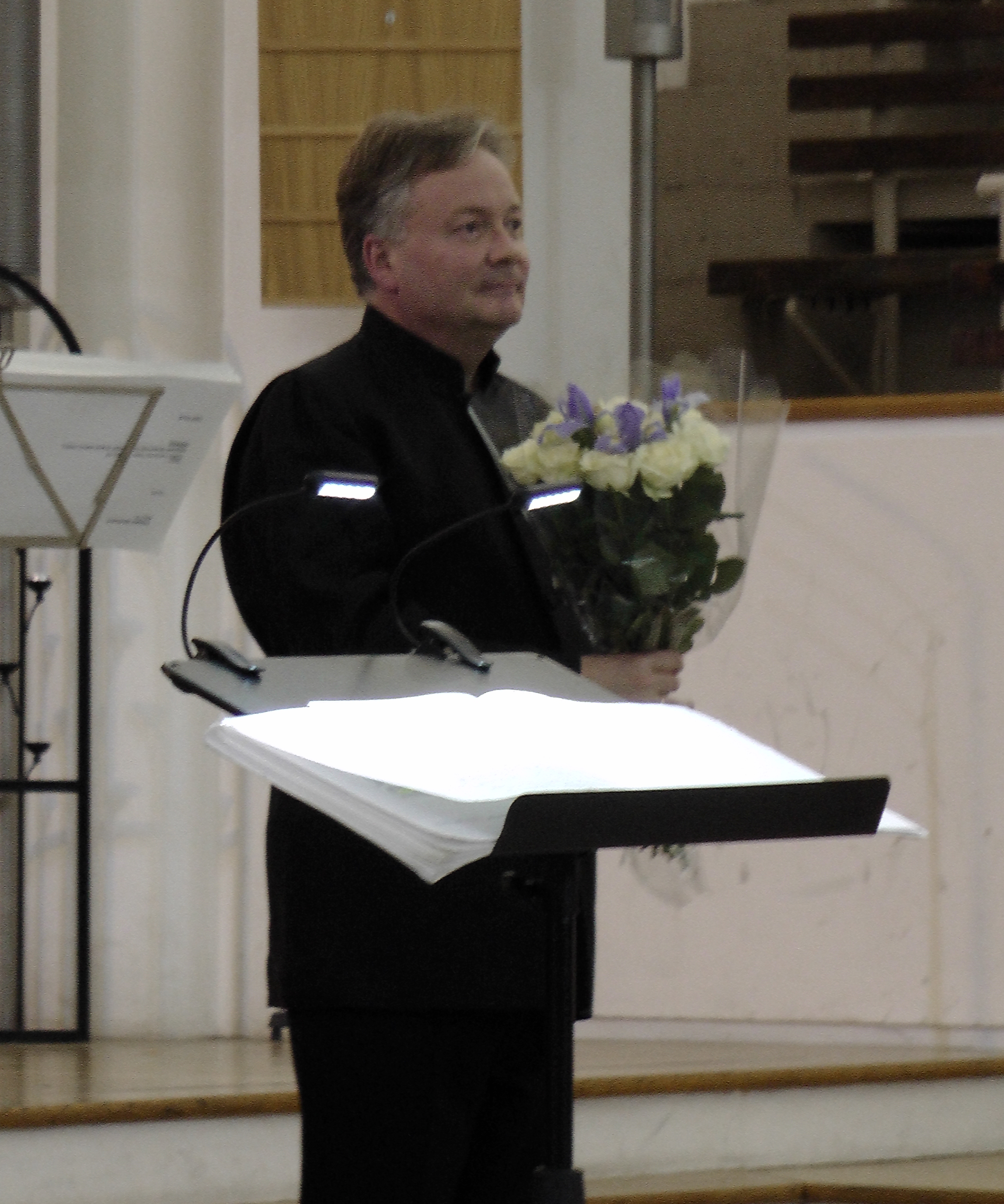 Дэвид Хилл на концерте в Санкт-Петербурге